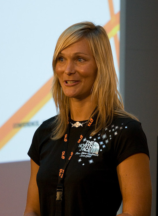 DLD 08